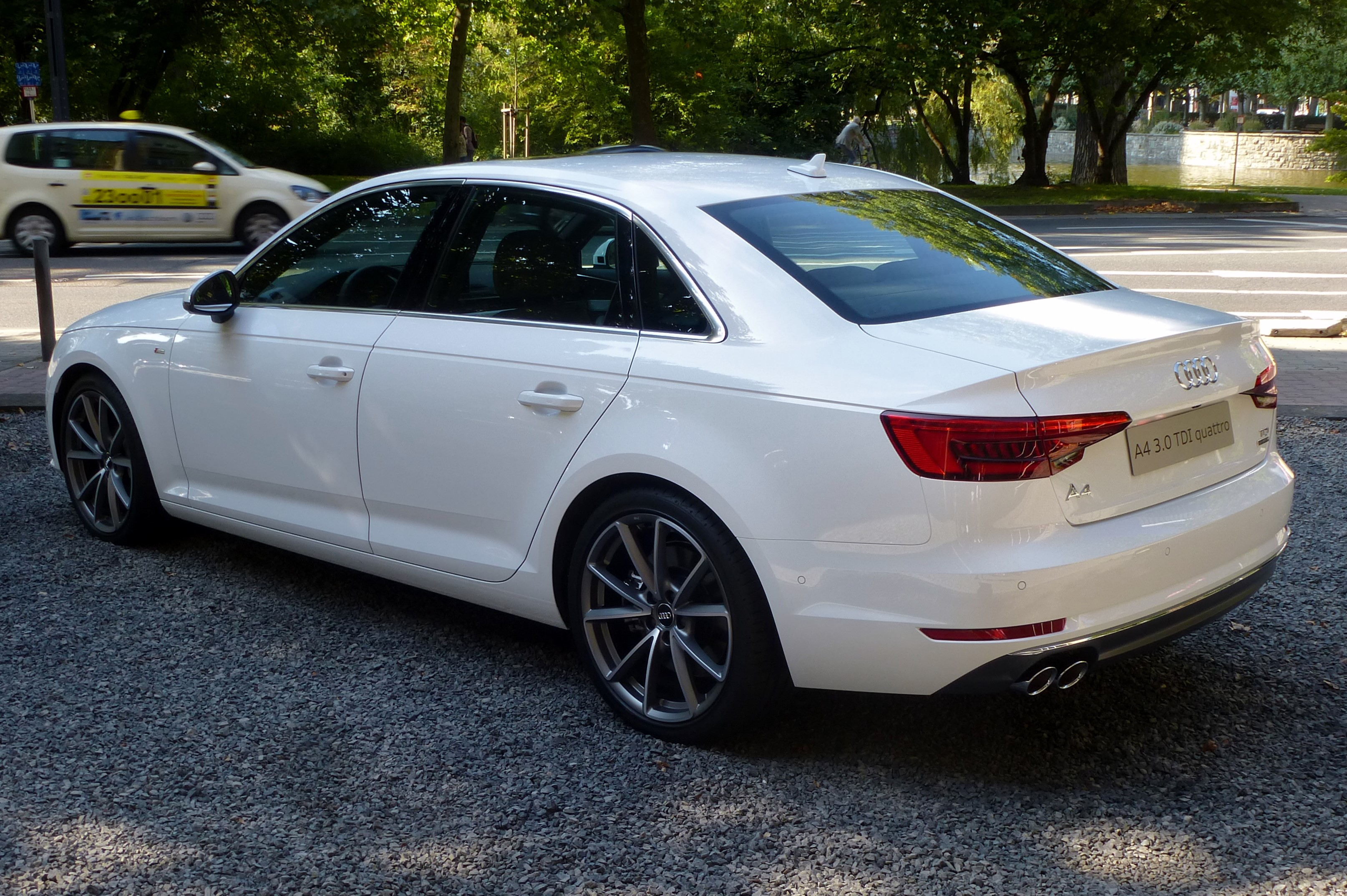 Audi A4 B9